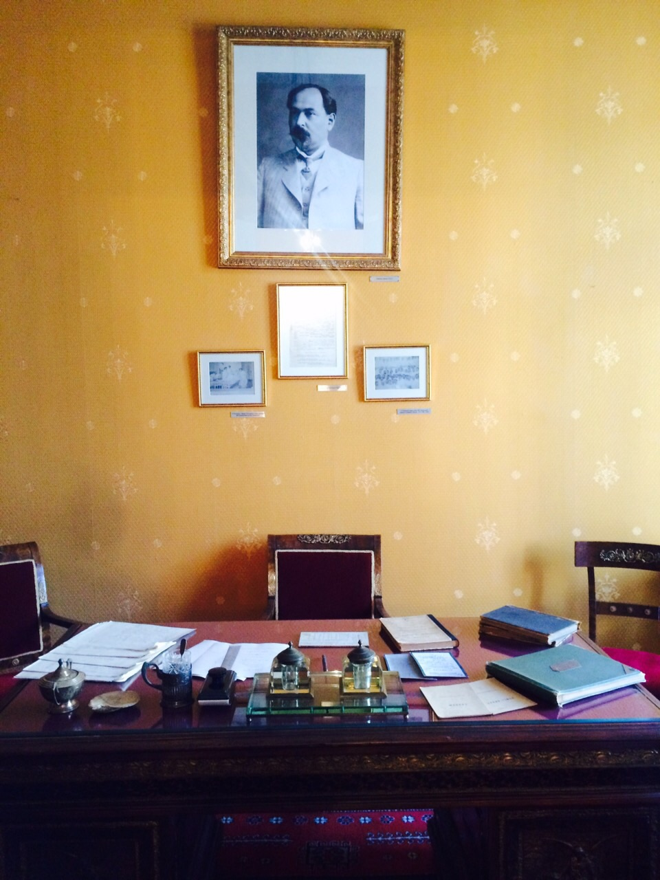 Nəriman Nərimanovun ev muzeyi, masa və ləvazimatları